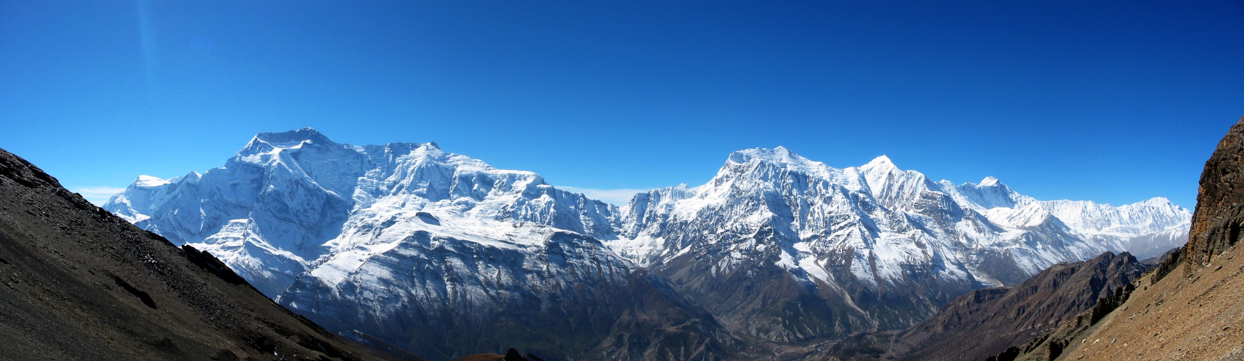 Face nord de la chaîne des annapurnas vue depuis le col du Kang La (5322)- de gauche à droite: Annapurna II, IV, III et Gangapurna, Annapurna I